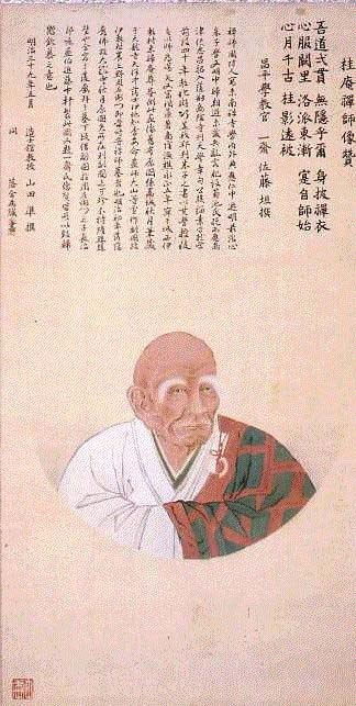 薩南学派を代表する学僧・桂庵玄樹の肖像画。